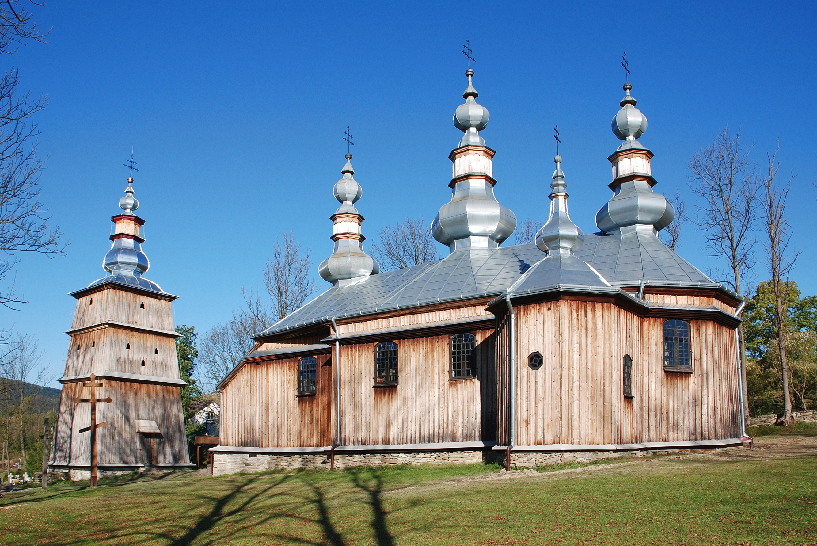 wieś Turzańsk